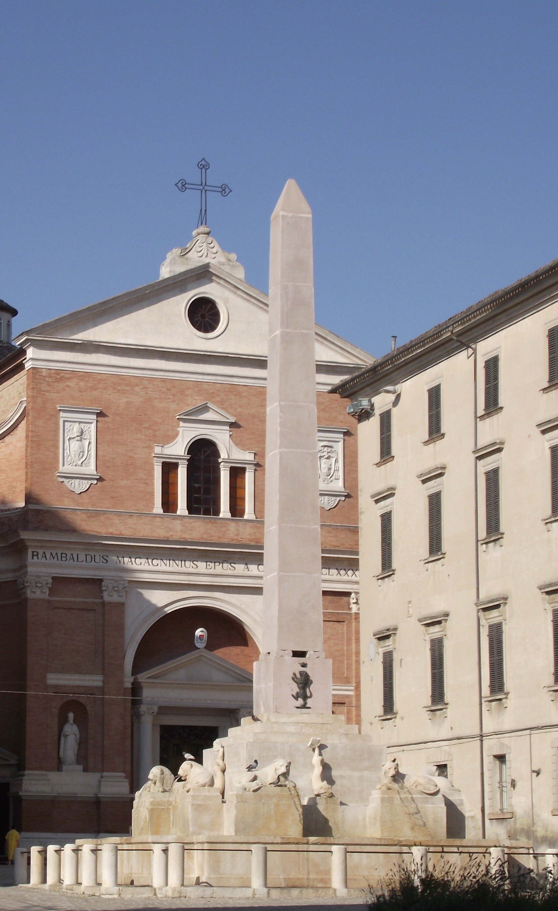 Fontana Obelisco, Raffaele Grilli e Luigi Amici, 1845